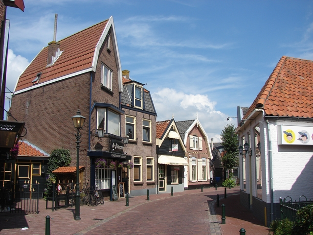 Nedersaksies: Spaokenburg straote